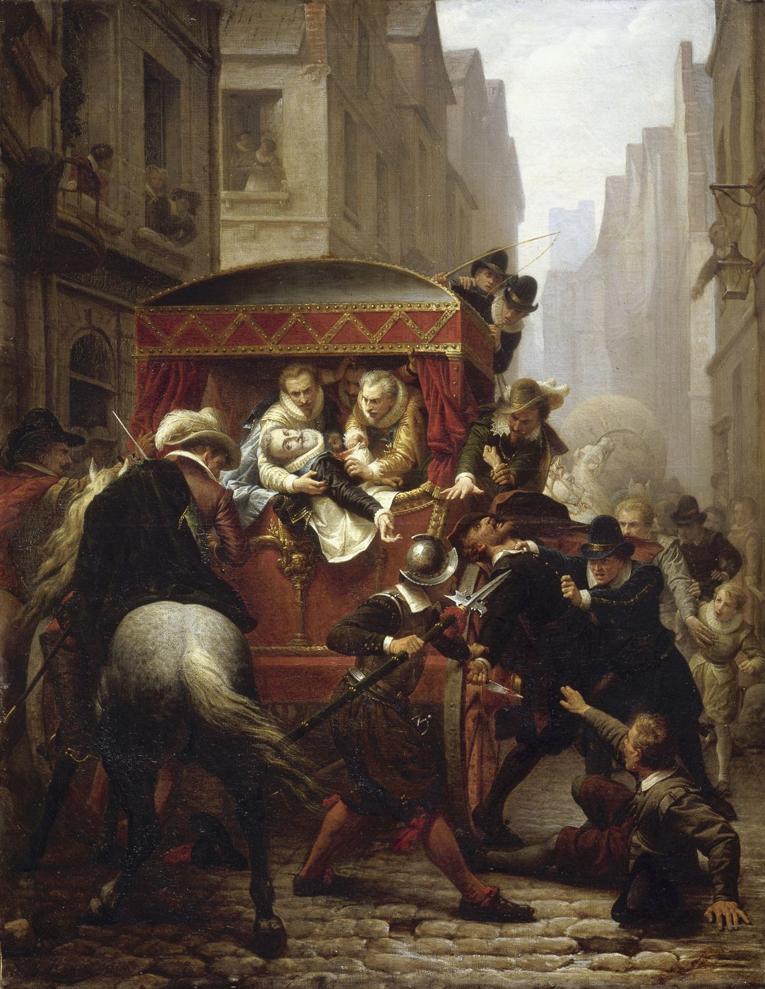 Assassinat d’Henri IV et arrestation de Ravaillac le 14 mai 1610, par Charles-Gustave Housez, XIXe siècle.